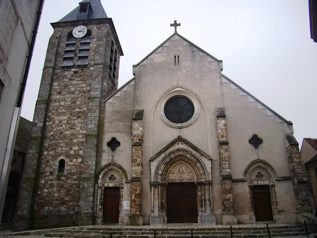 Eglise Notre-Dame-de-l'Assomption, Monlthéry (91)